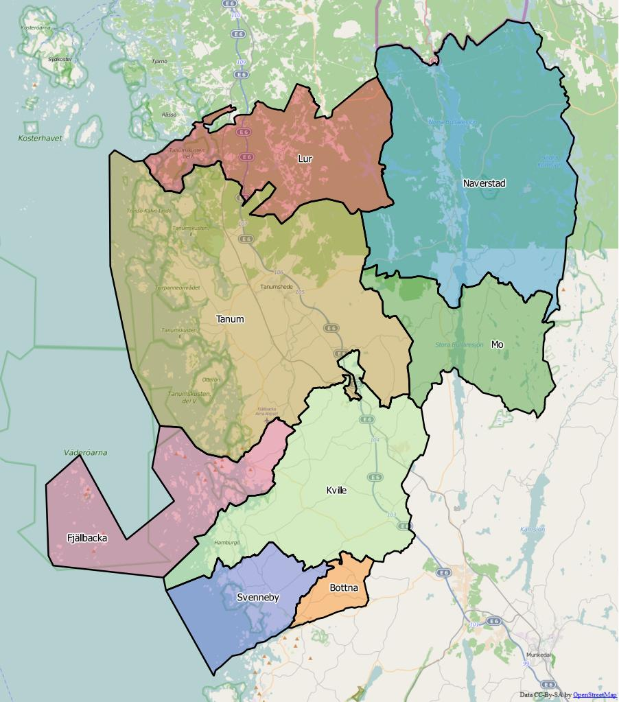 Distriktsindelningen i Tanums kommun World file: 102.35518209457048044 0 0 -102.35518209457048044 1219146.00291509460657835 8163568.76007548905909061